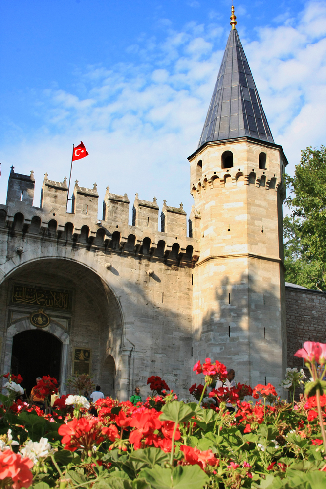 Topkapi